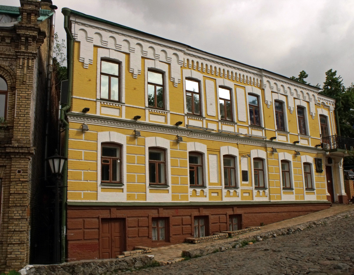 Будинок, в якому жив письменник М. П. Булгаков, Київ, Андріївський узвіз, 13